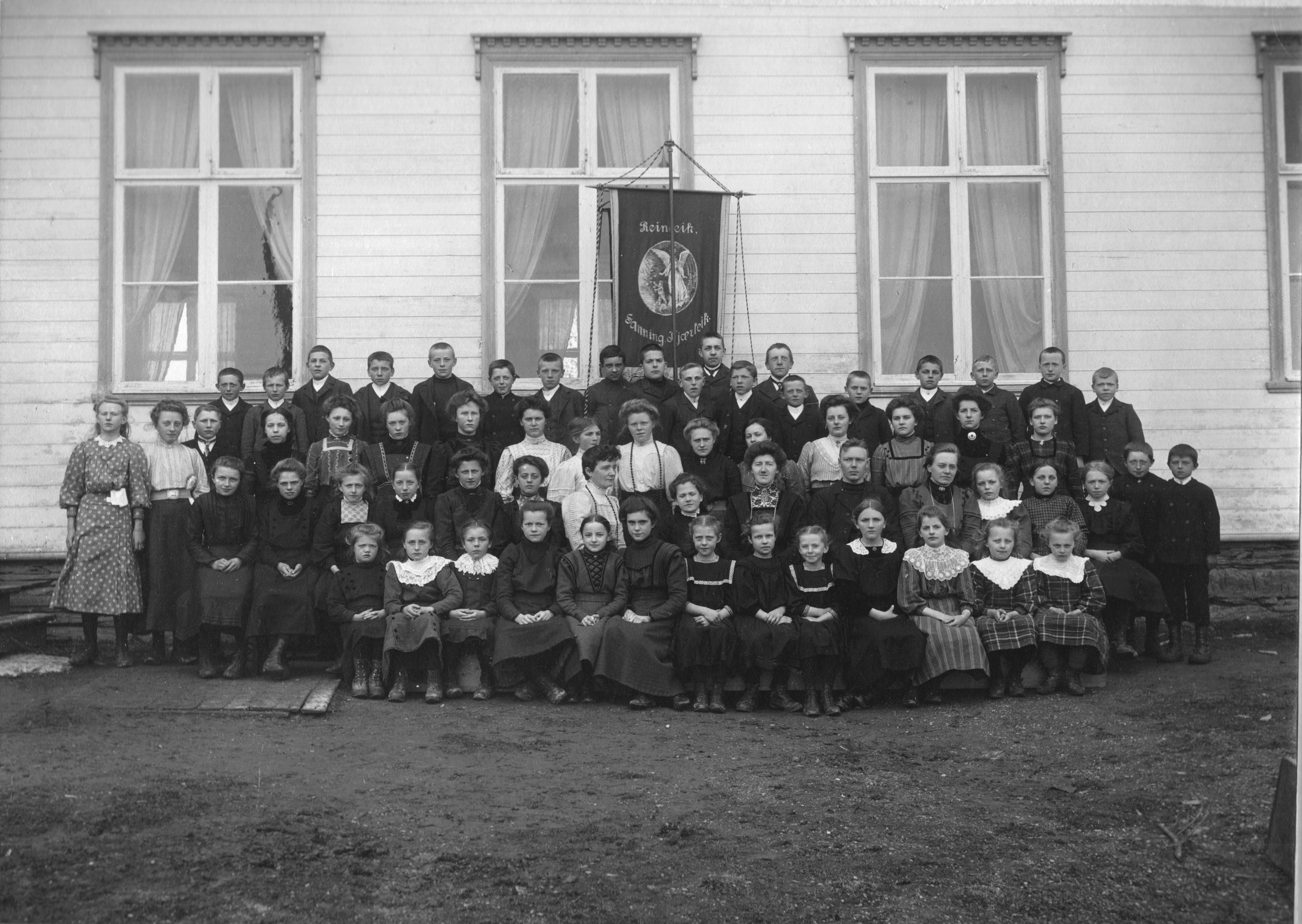 Barnelosje ved forsamlingshuset Breidablikk i Åsen. I andre rekke (f.v.) sitter bl.a. Katinka Rones (nr. 7) Petra Vordal (nr. 9) og Nikoline (Aune) Vedul (nr. 11). Bildet er tatt før 1915. Fotograf / Photographer: Ukjent Fotoeier / Photo owner: Åsen Museum og Historielag Digitalisering / Digitizing: Arne Langås Foto-ID / Photo ID: 001-0072 Har du utfyllende opplysninger? Legg gjerne igjen en kommentar nedenfor eller send e-post til . | Do you have additional information? Please leave a comment or send an e-mail to .